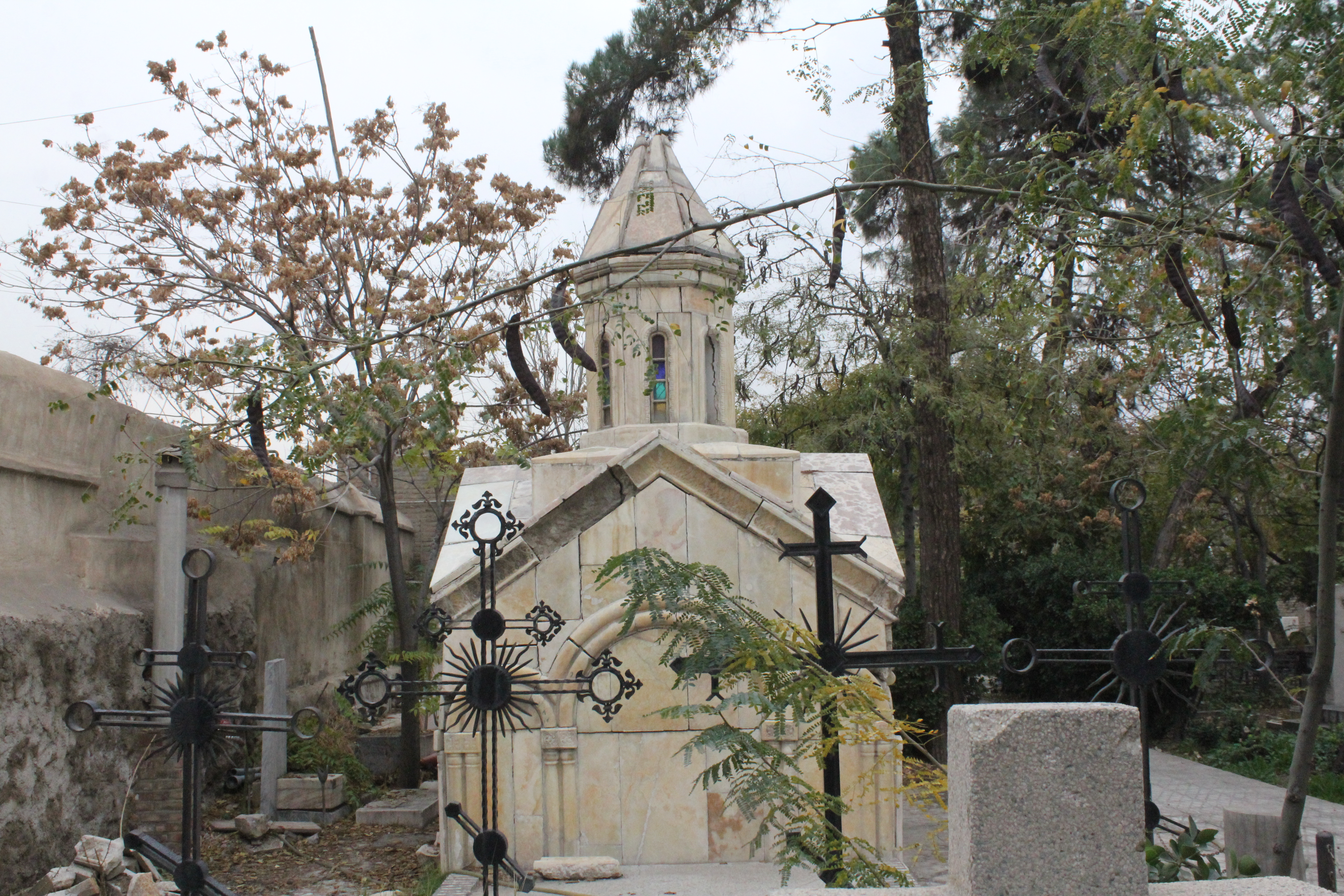 آرامگاه شاهزاده گرجی